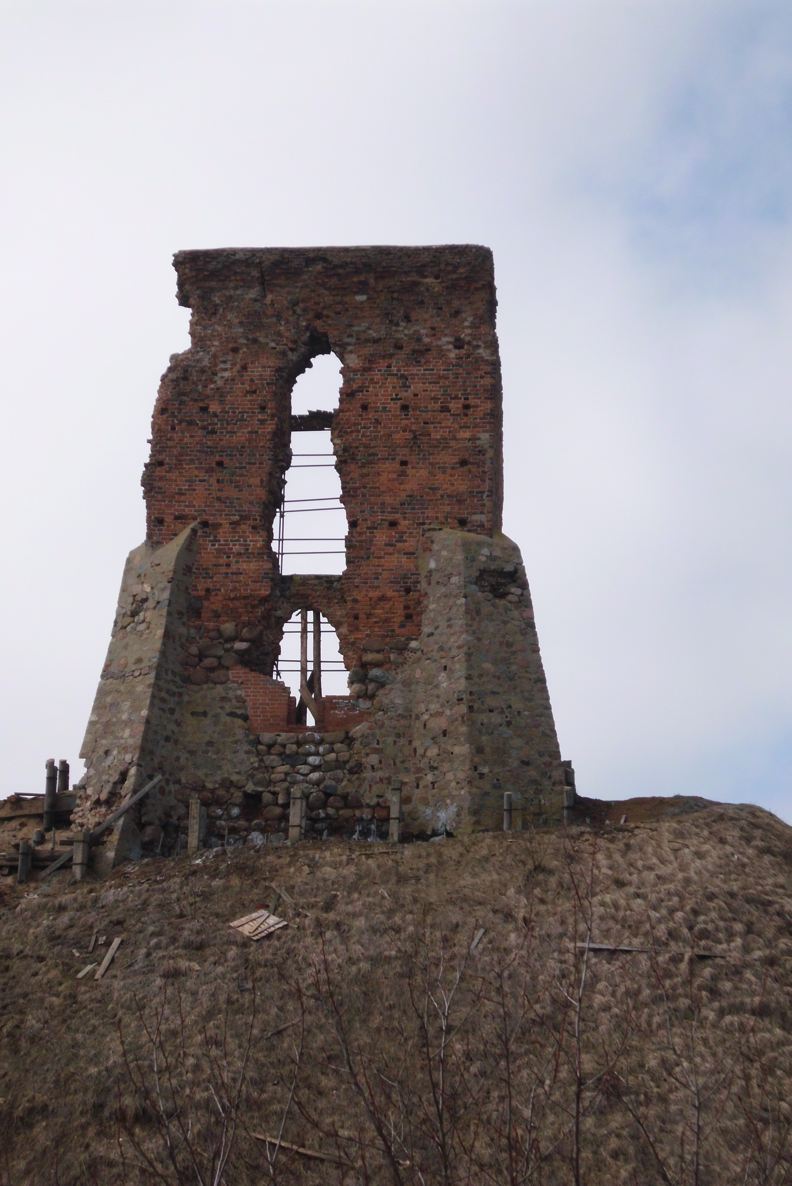 Nowogródek wiosną 2013